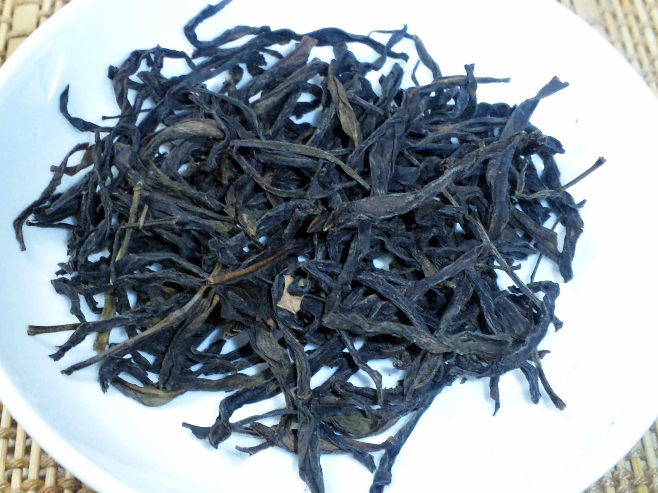 鳳凰単欉の茶葉の様子